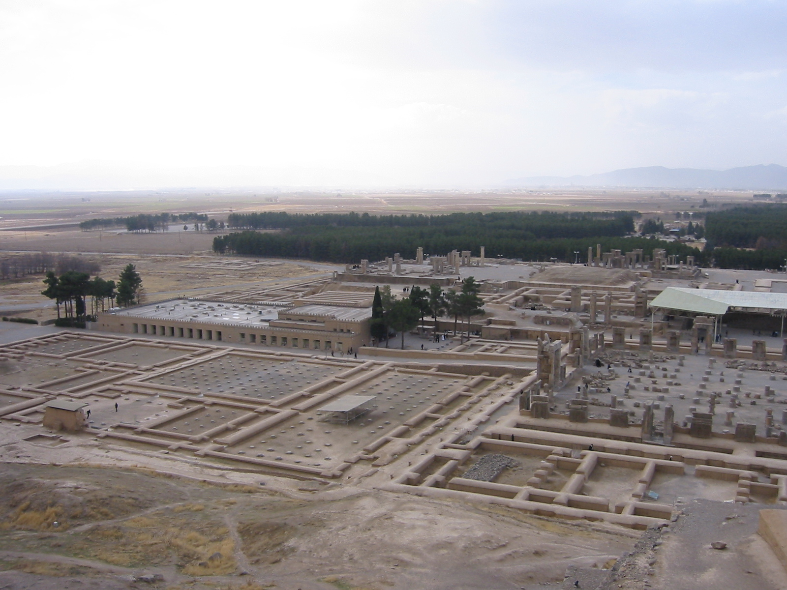 Persepolis